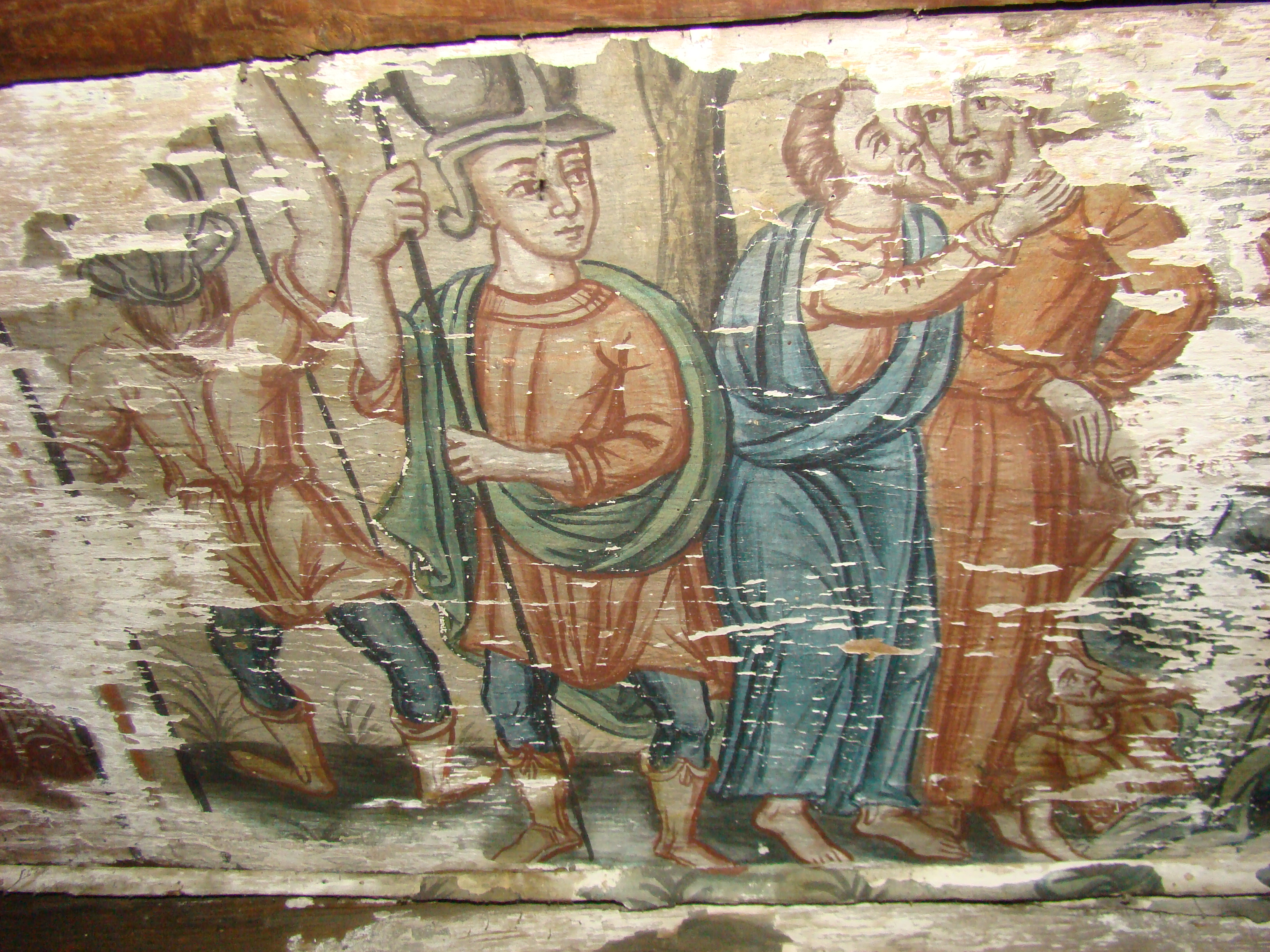 Biserica de lemn „Cuvioasa Paraschiva” Stâncești